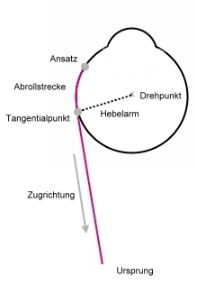 Abrollstrecke und Muskelebene eines Augenmuskels